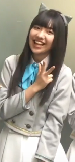 わーすたです。